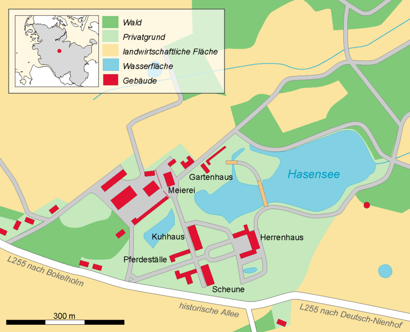 Karte von Gut Emkendorf